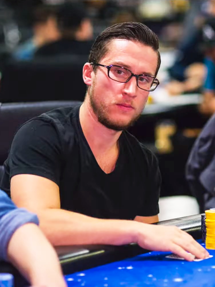 Daniel Dvoress bei der WPT Playground